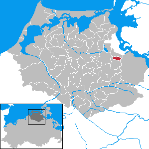 Zarrendorf in Mecklenburg-Vorpommern - District Nordvorpommern